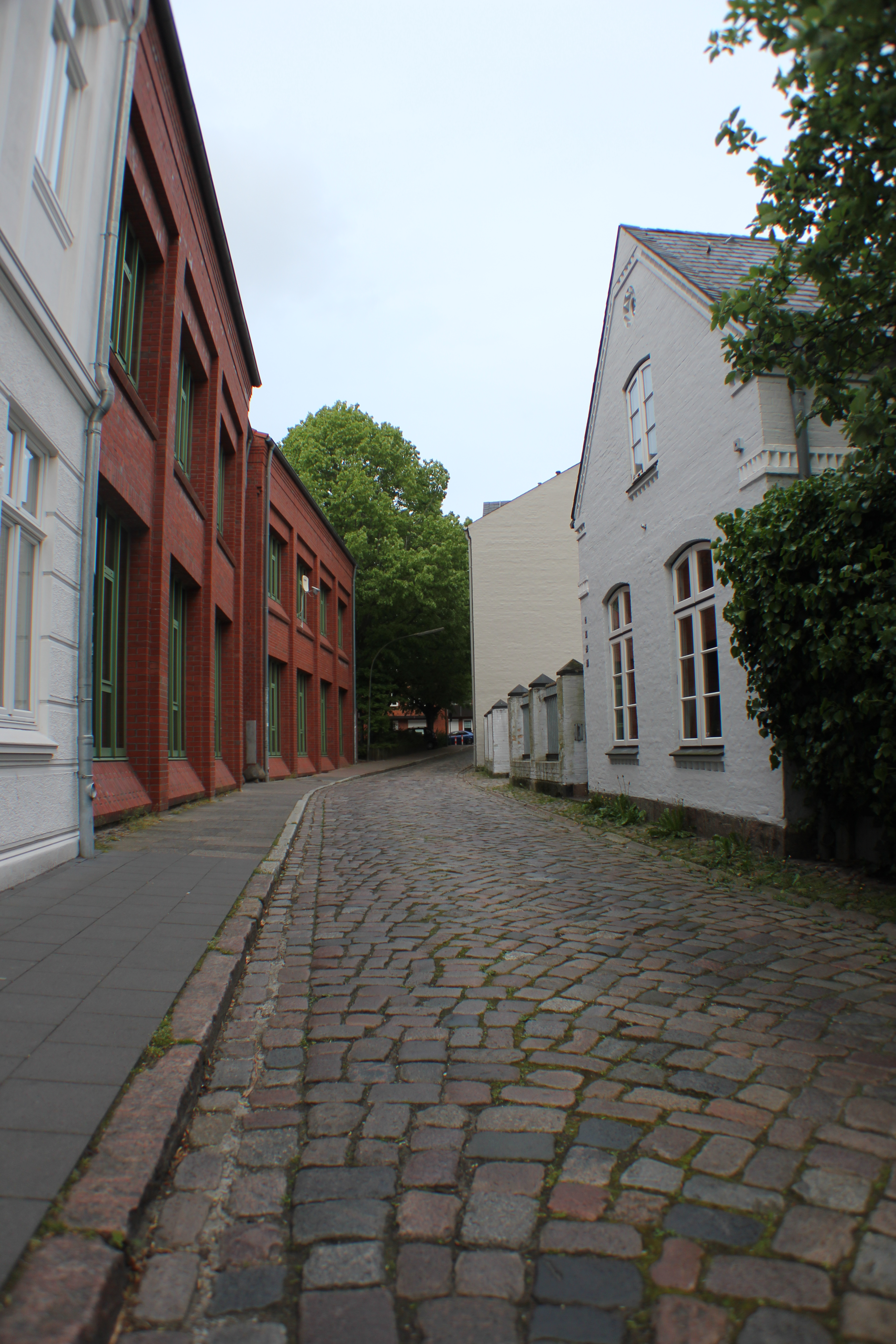 Ungefährer Standort der Dammhofpforte, Bild 02